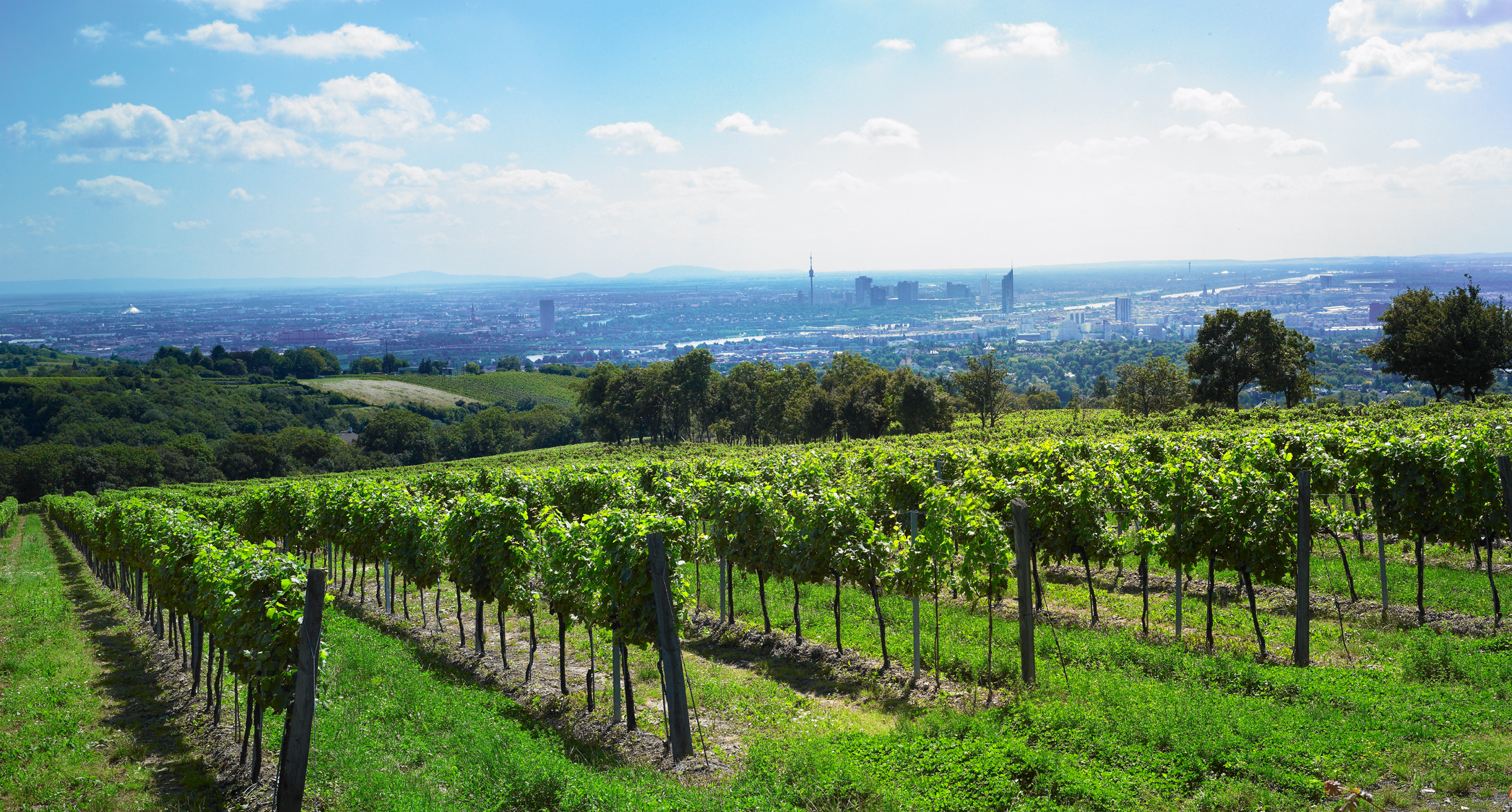 Blick von den Weingärten im Westen auf die österreichische Bundeshauptstadt Wien